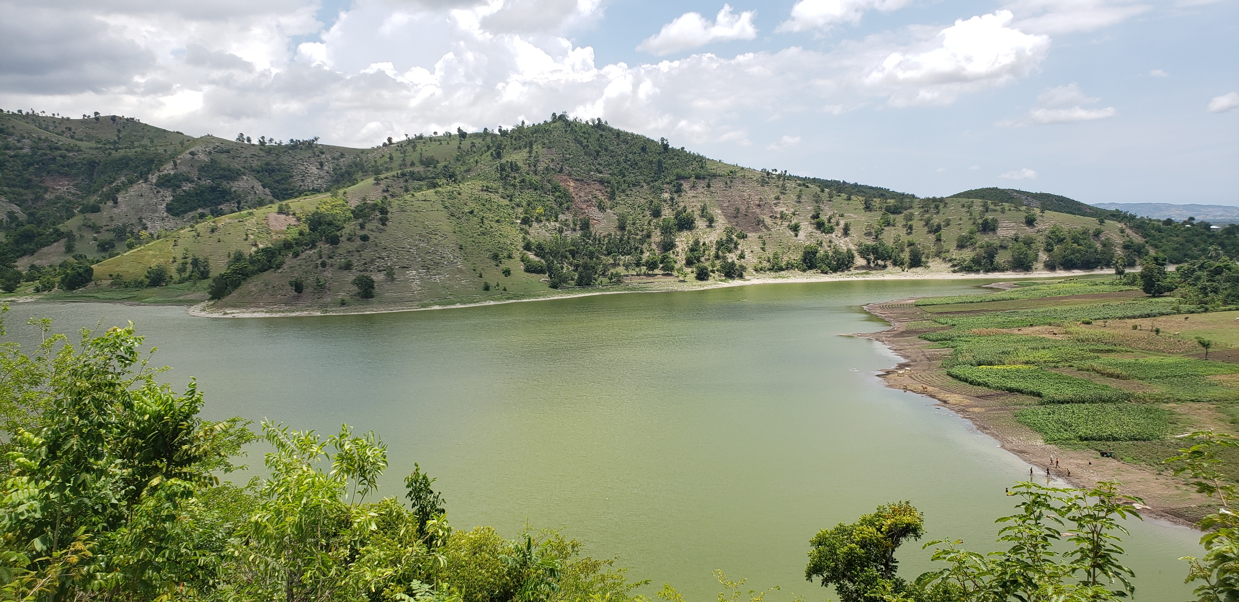 Vue de l'etang Lachaux - Route de Bourg Jorly